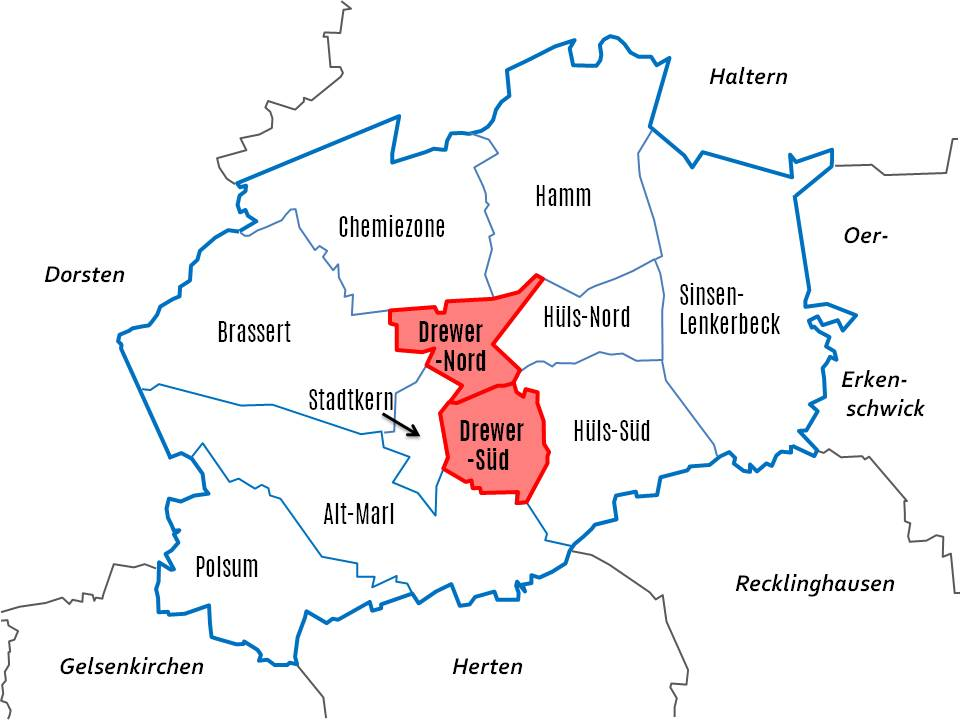 Karte der Stadt Marl mit farblicher Markierung des Stadtteil Drewer